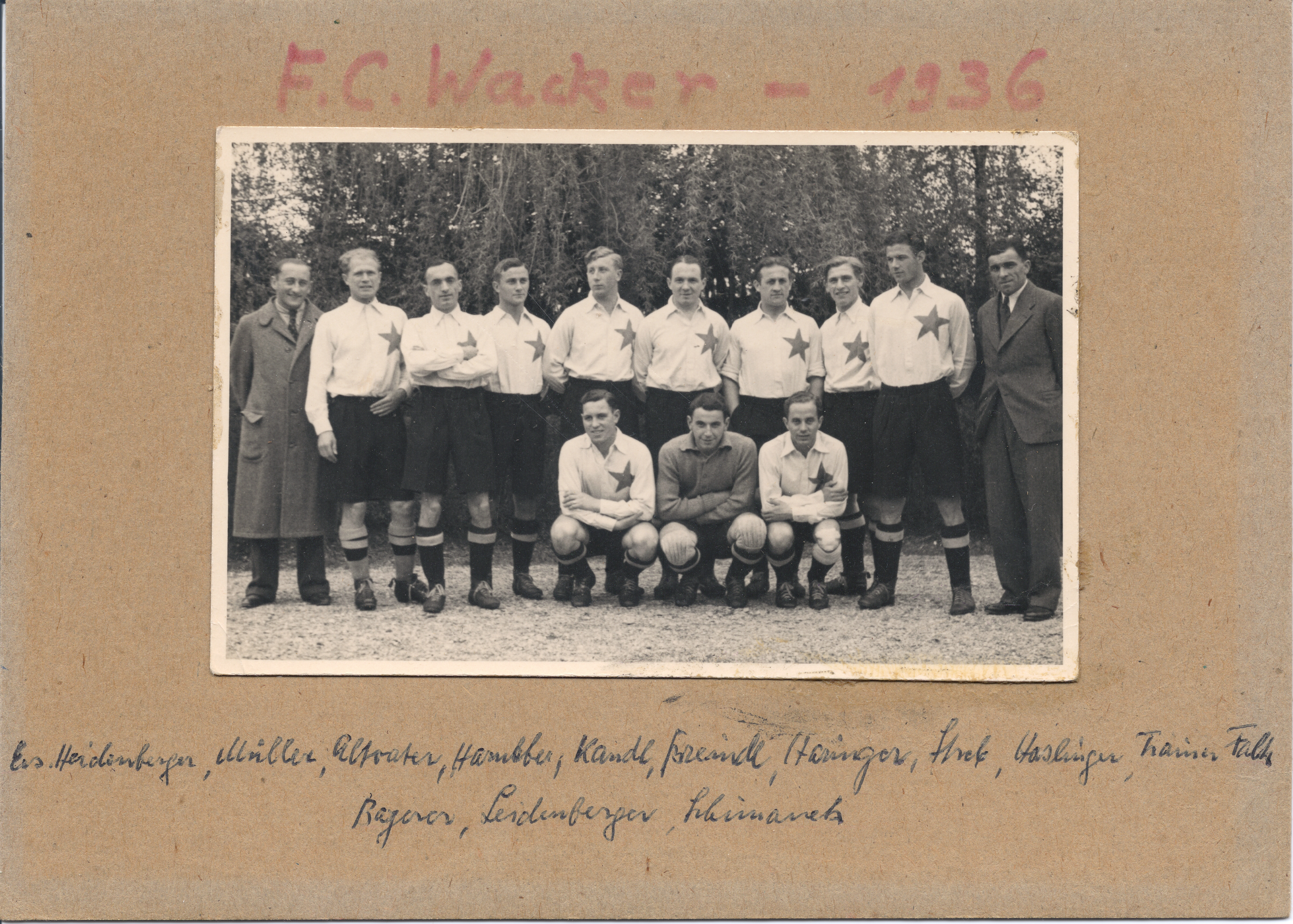 Herrenmannschaft des FC Wacker München 1936 in der NS-Zeit (Gauliga Bayern)